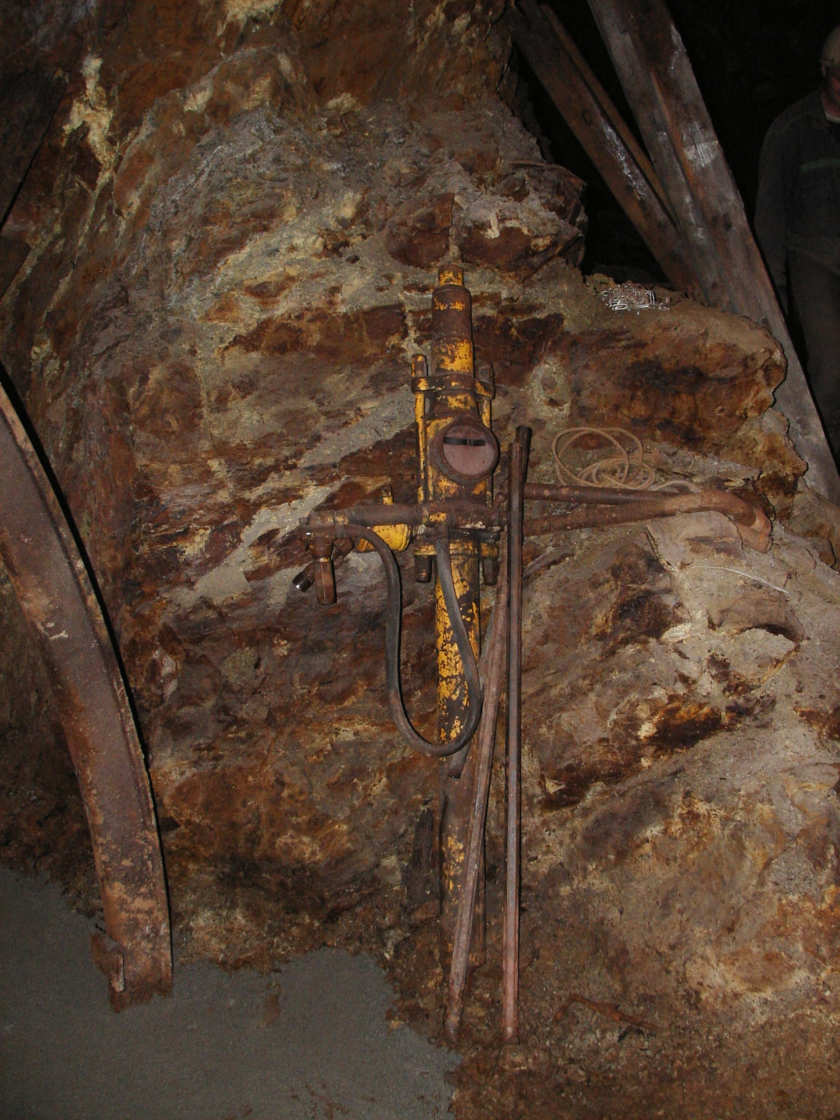 Stará důlní vrtačka ve štole Svornost